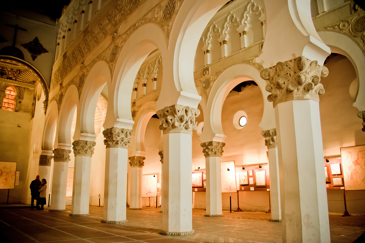 Santa María La Blanca * sinagoga en TOLEDO